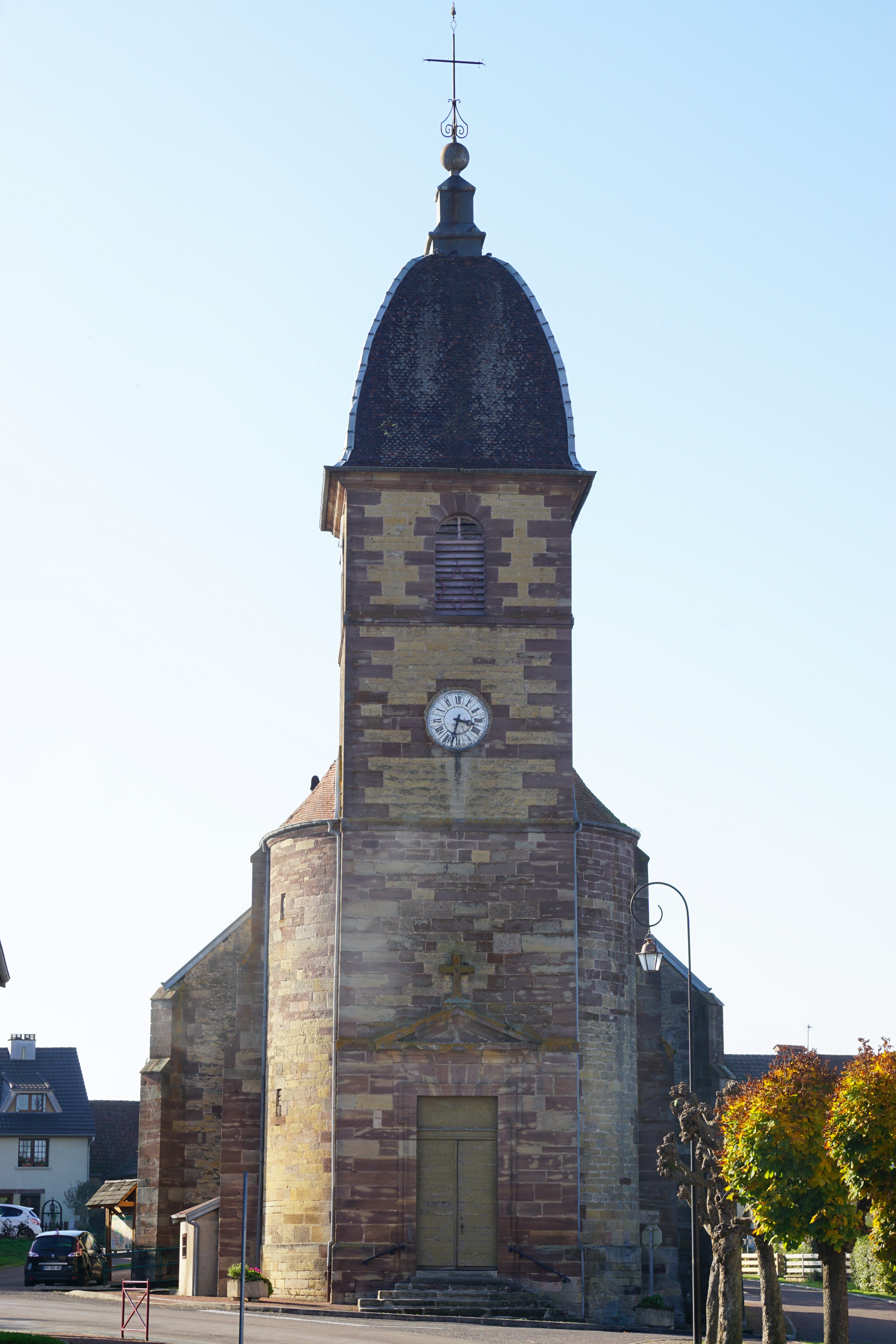 L'église Saint-Vincent de Meurcourt.